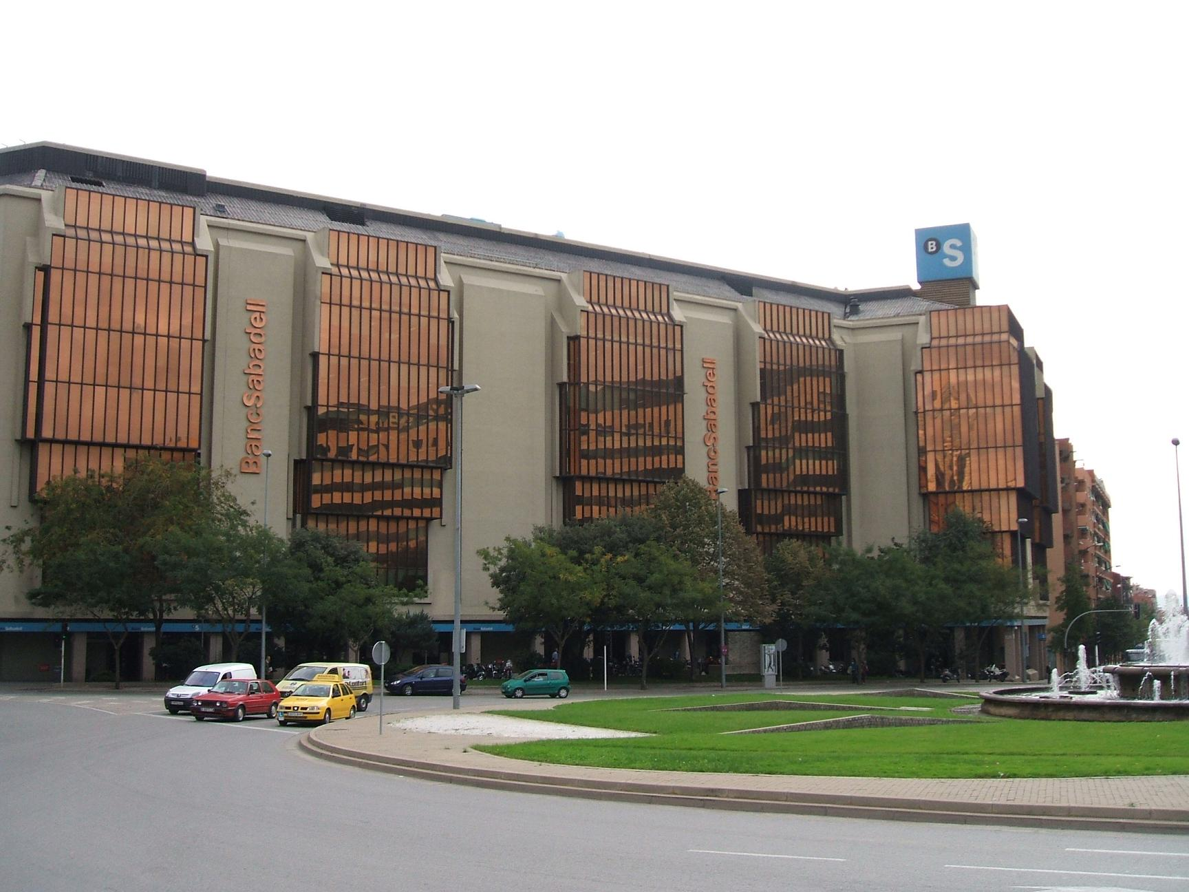 Banco Sabadell Headquarters in Sabadell, Catalonia